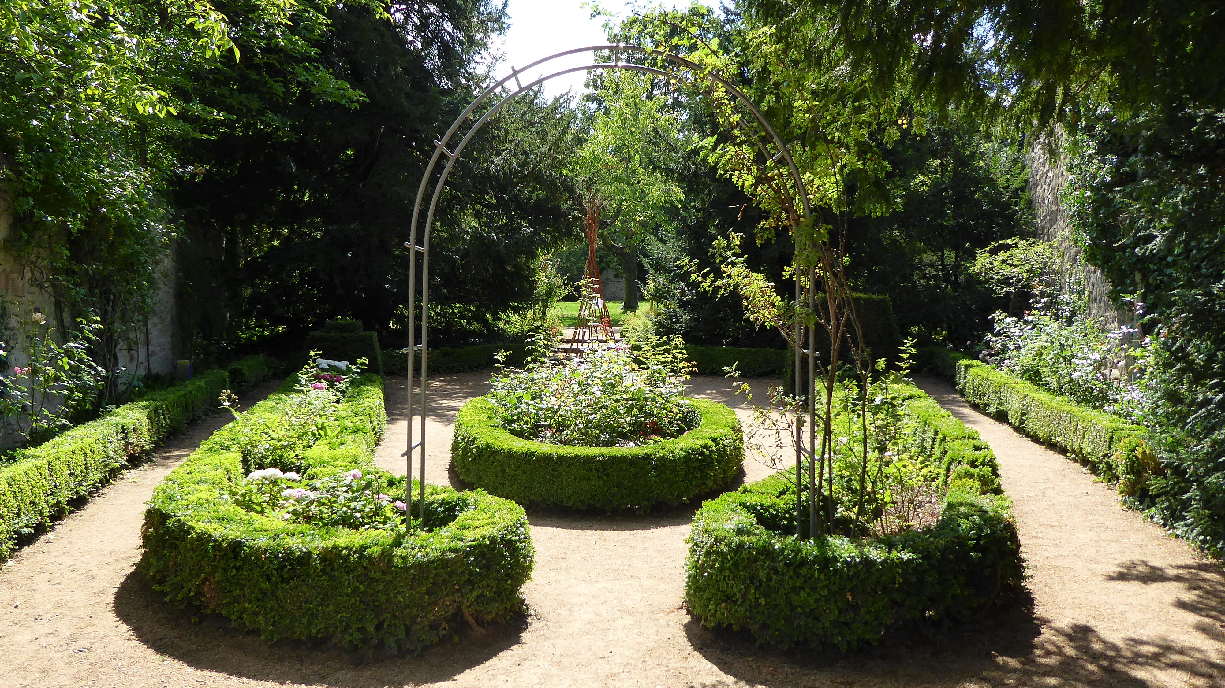 Rosengarten